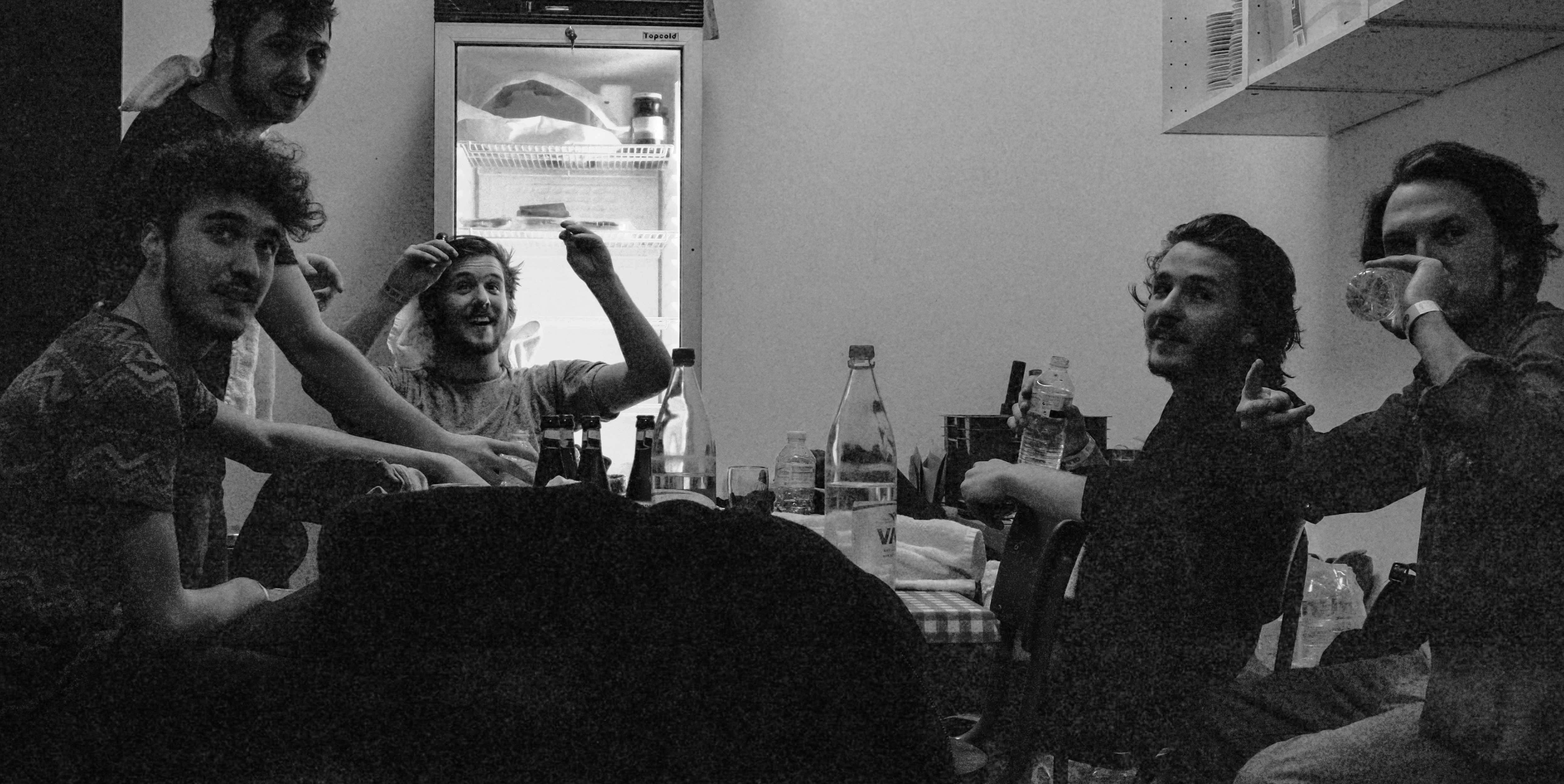 Bazart backstage (licht geretoucheerd)